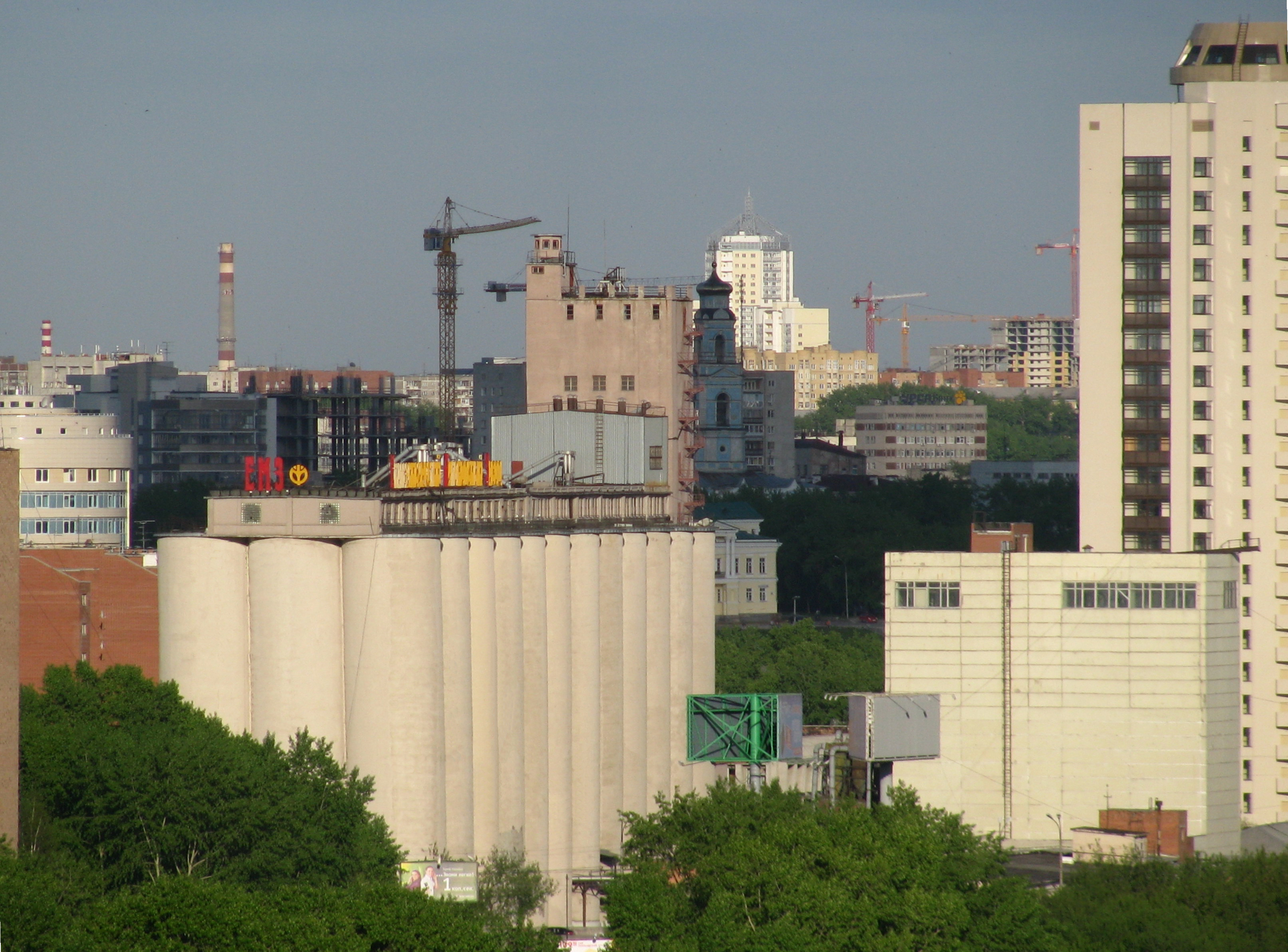 Вид на ЕМЗ, на дальнем плане — Новосвердловская ТЭЦ, Вознесенская церковь, ЖК «Университетский»